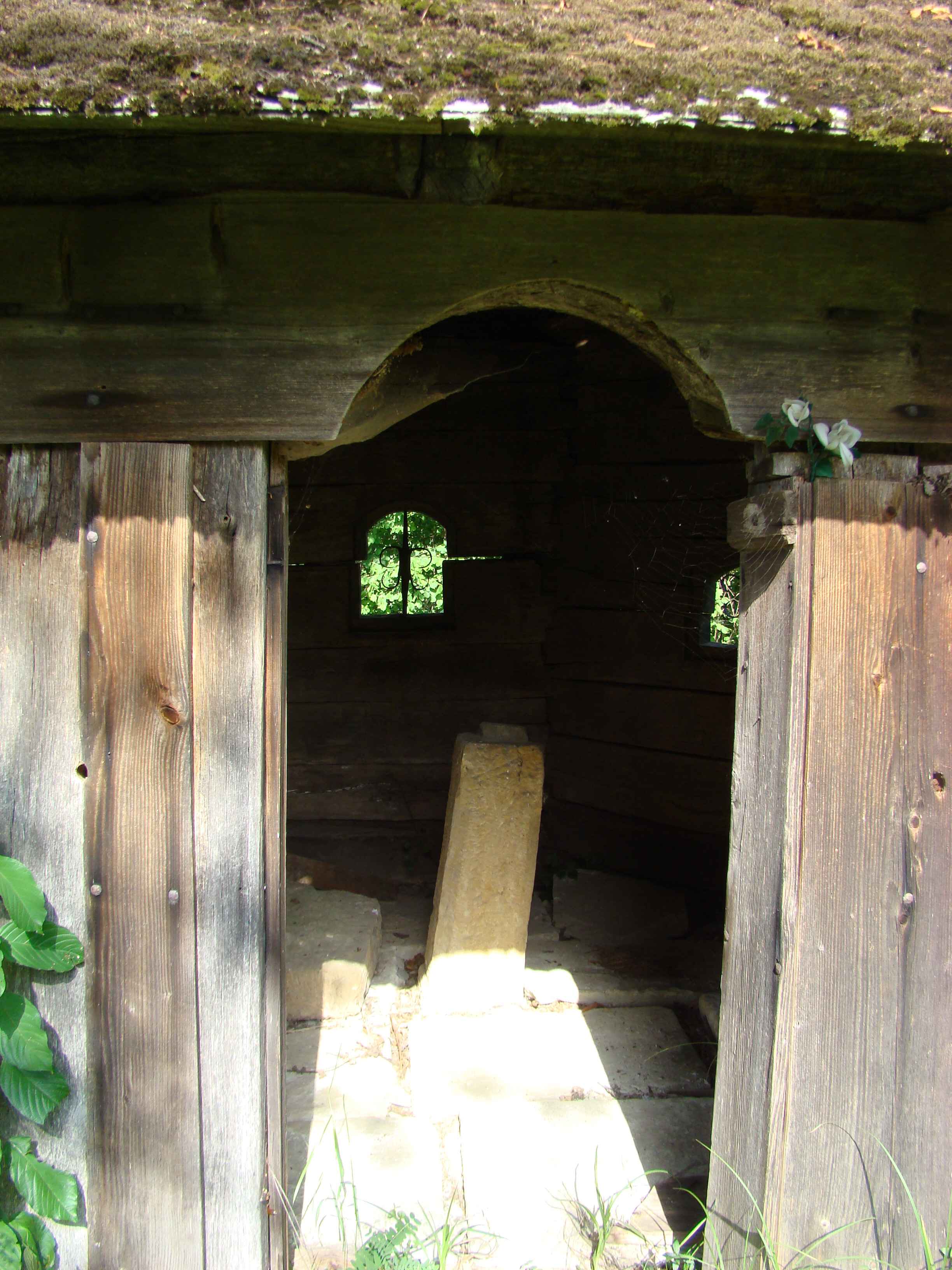 Absida bisericii de lemn "Sf. Arhangheli Mihail şi Gavril" , sat aparţinător CUFOAIA; oraş TÂRGU LĂPUŞ